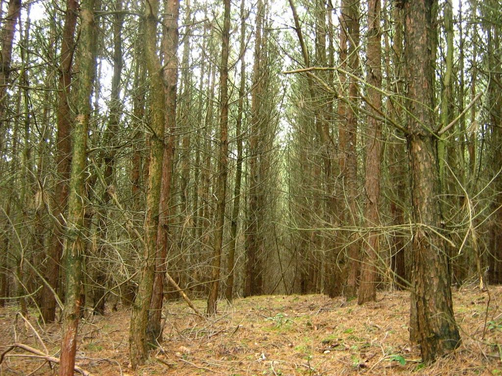 Kiefernstangenholz in der Baumgartner Heide (Stadt Gransee, Brandenburg).